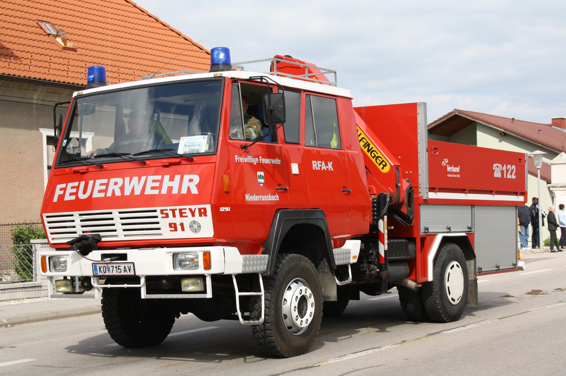 Einsatzfahrzeug der Feuerwehr Niederrußbach